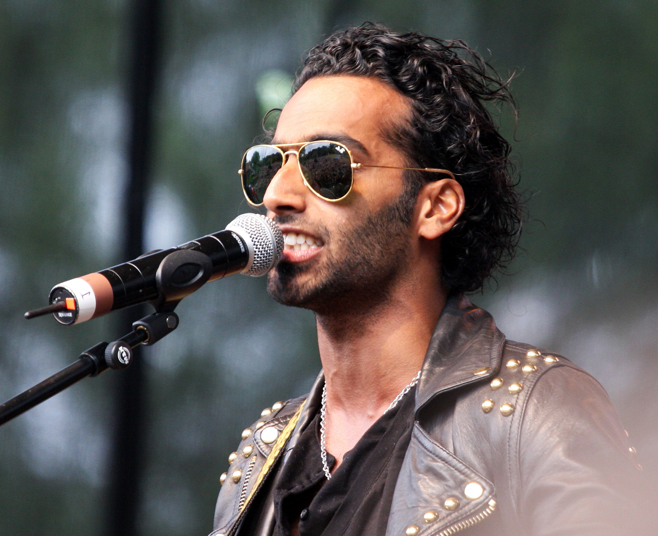 Chand Torsvik norsk artist - Her i VG-lista i Stavanger